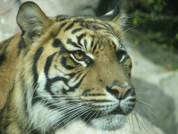 Sumatran Tiger